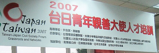 2007臺日青年親善大使人才培訓。2007年4月7～8日在屏東貢寮。